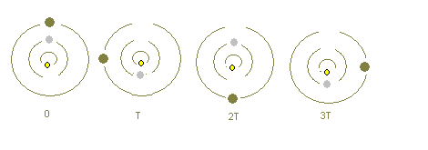 Illustration de la résonance de Io Europa Ganymède.